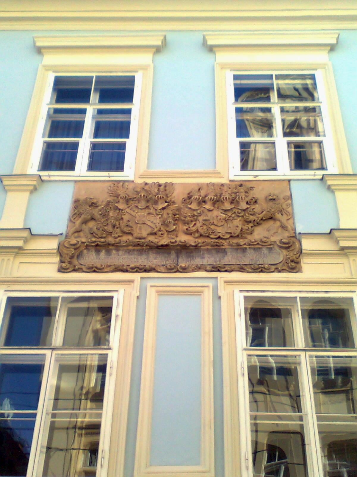 Palais Kollonitsch, Graz, Fassadenausschnitt mit Allianzwappen